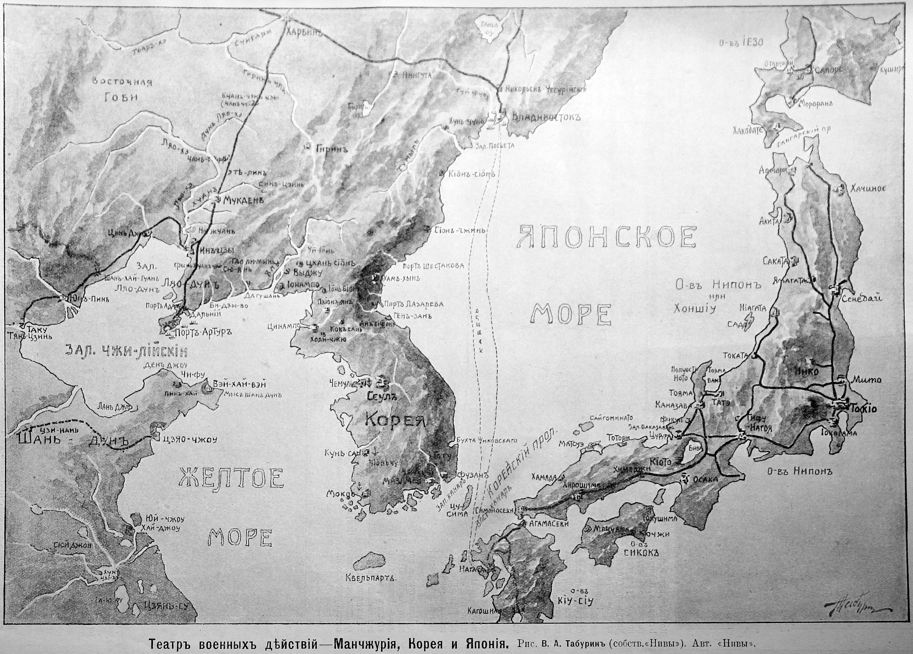 Табурин - Театр военных действий - Манчжурия, Корея и Япония.